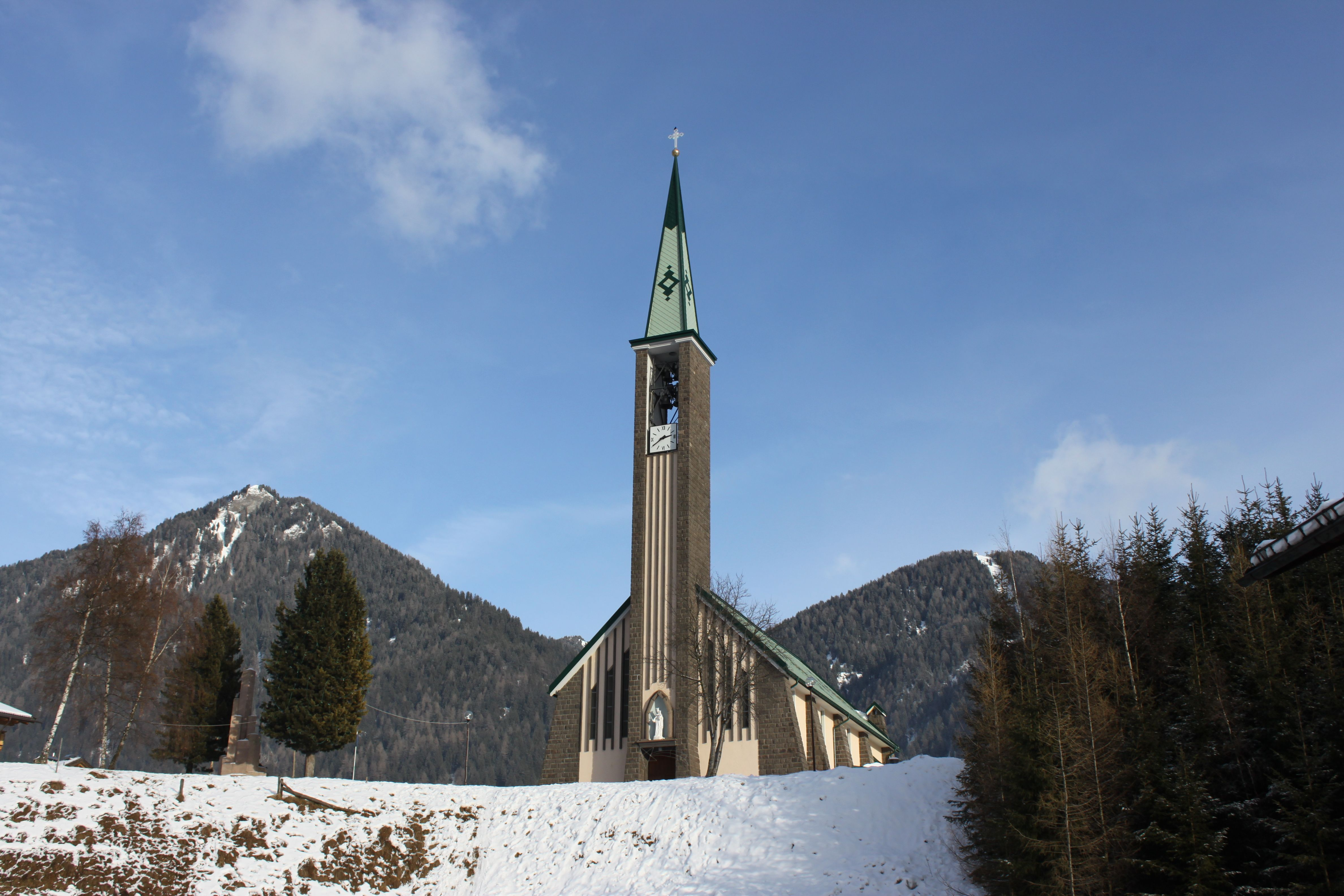 Chiesa di Pozza di Fassa